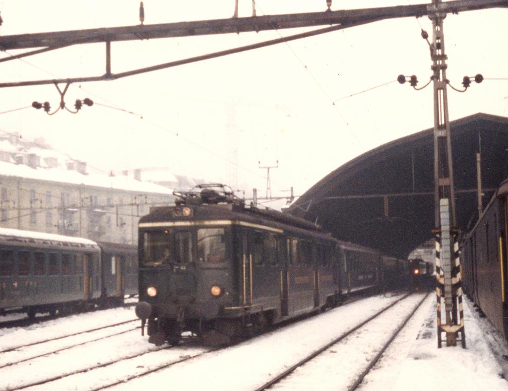 Triebwagen ABDe 2/4 44 der Bodensee-Toggenburg-Bahn in St. Gallen HB